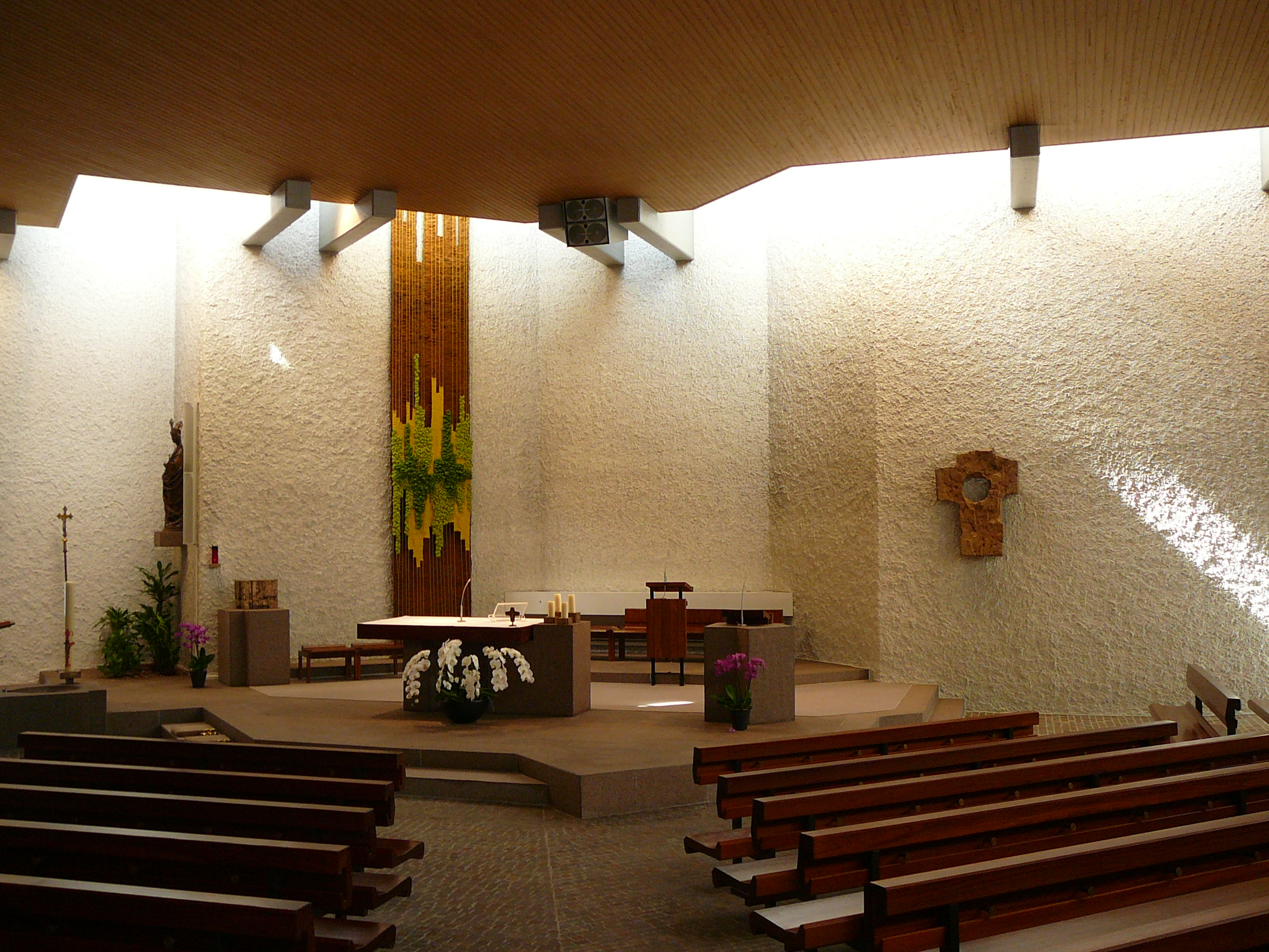 Römisch-katholische Pfarrkirche St. Katharina Zürich-Affoltern, Altarraum mit Wandteppich aus dem Kloster Seedorf Uri